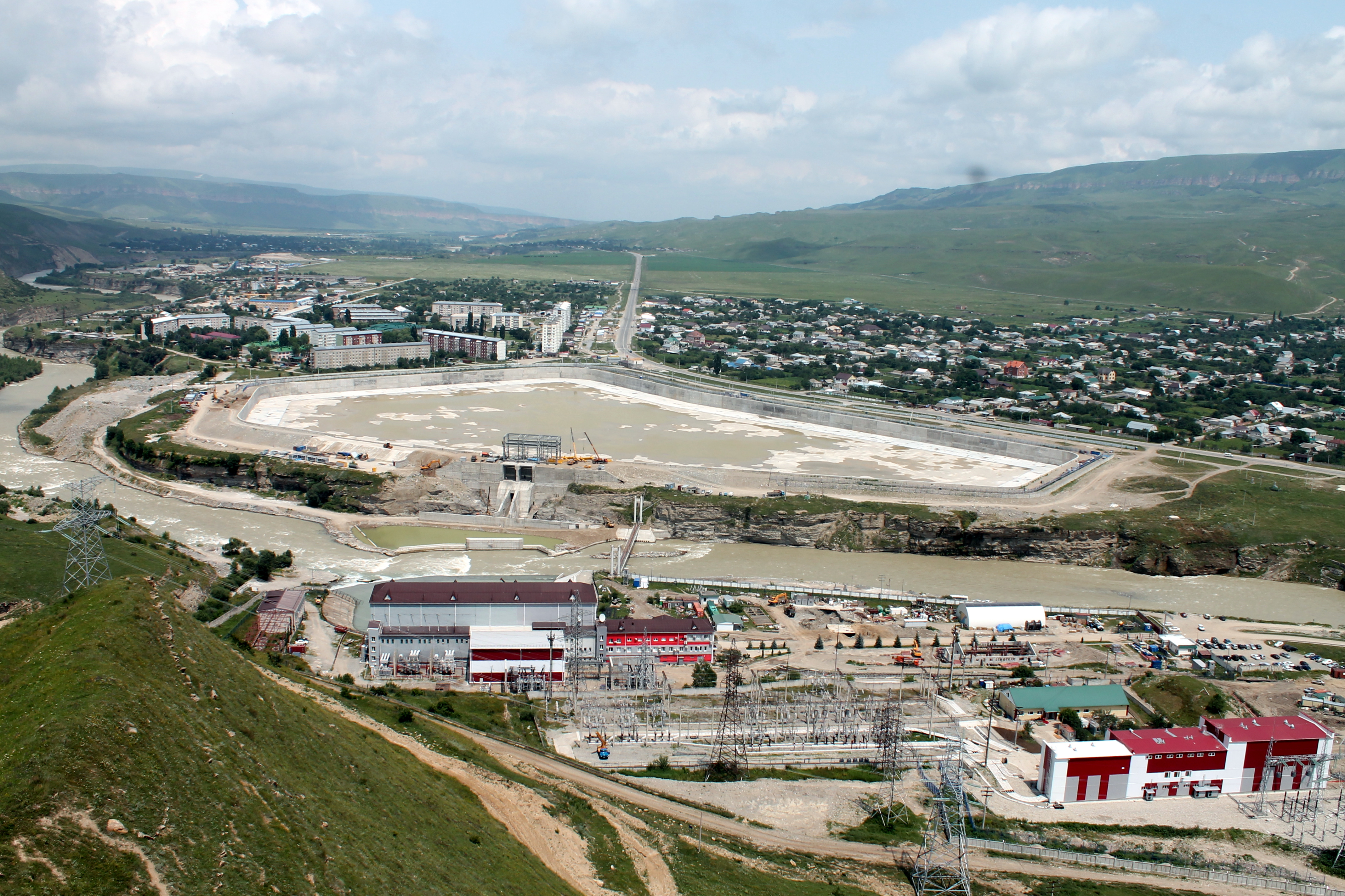 Панорама Зеленчукской ГЭС-ГАЭС на этапе завершения строительства, июль 2015